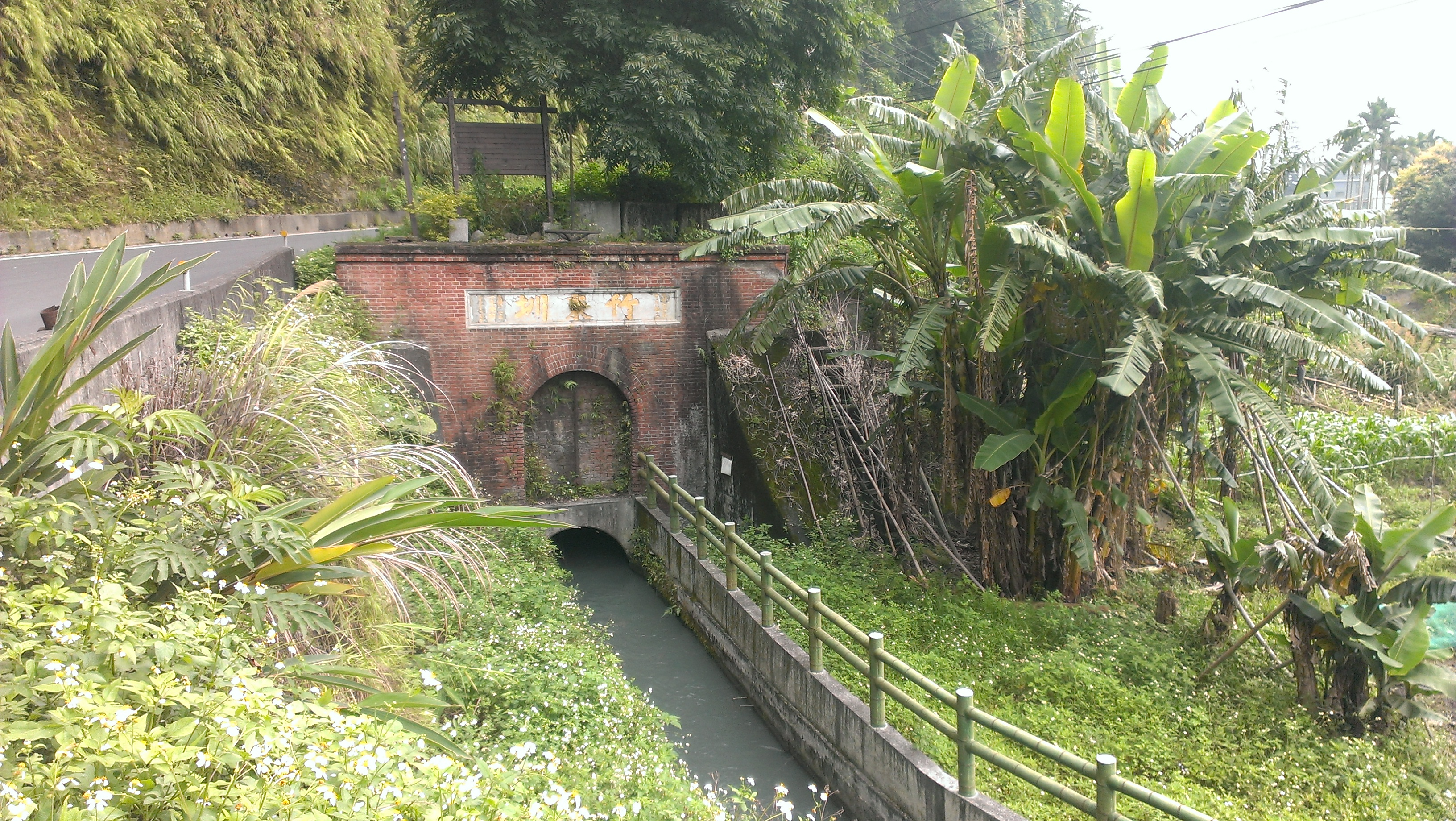 竹東圳一號隧道一